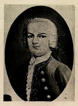 Retrato de Manuel Antonio Warnes (1727-1802) militar español de origen irlandés. Sirvió en Buenos Aires como alcalde y regidor.